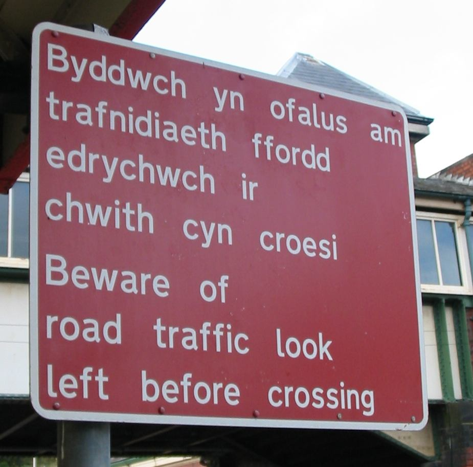 Bangor station bilingual crossing sign